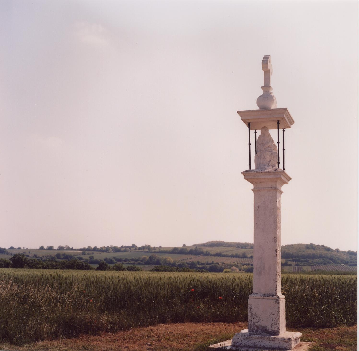 Bildstock in der Nähe von Pulkau